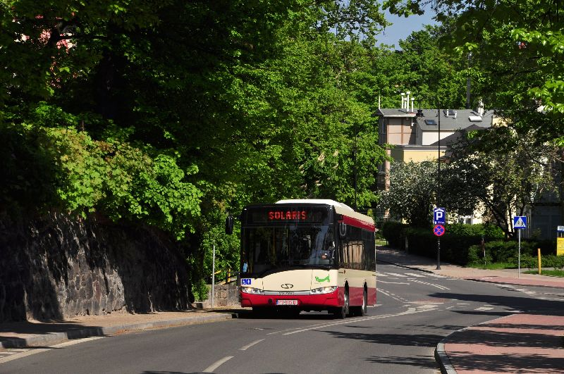 Alpino 8,9 LE